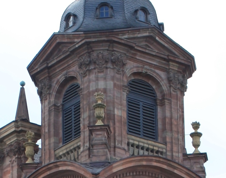 Nördlicher Glockenturm der Jesuitenkirche in Mannheim.